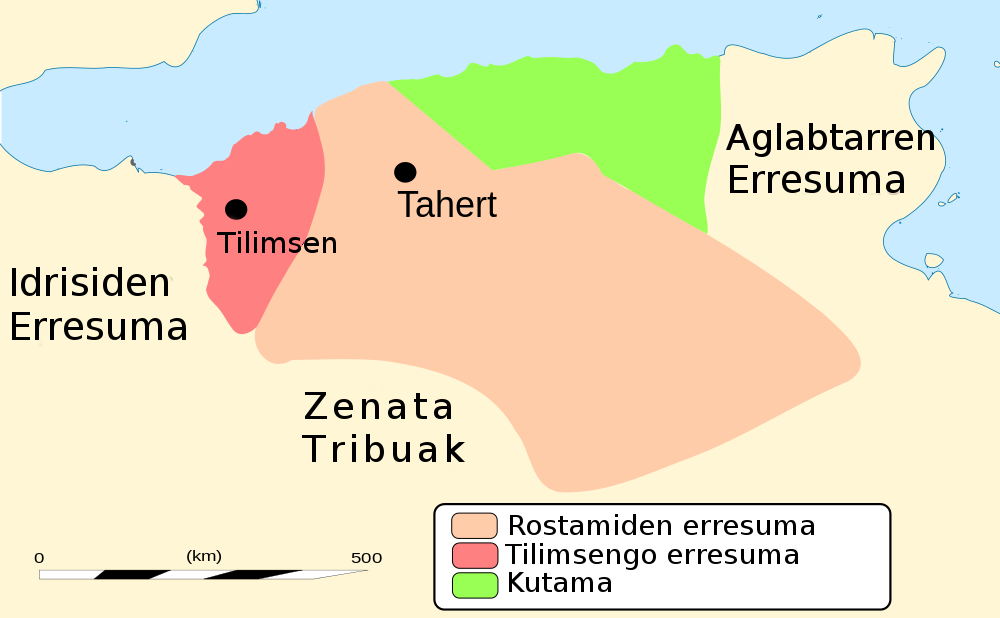 Aljeria 815-915